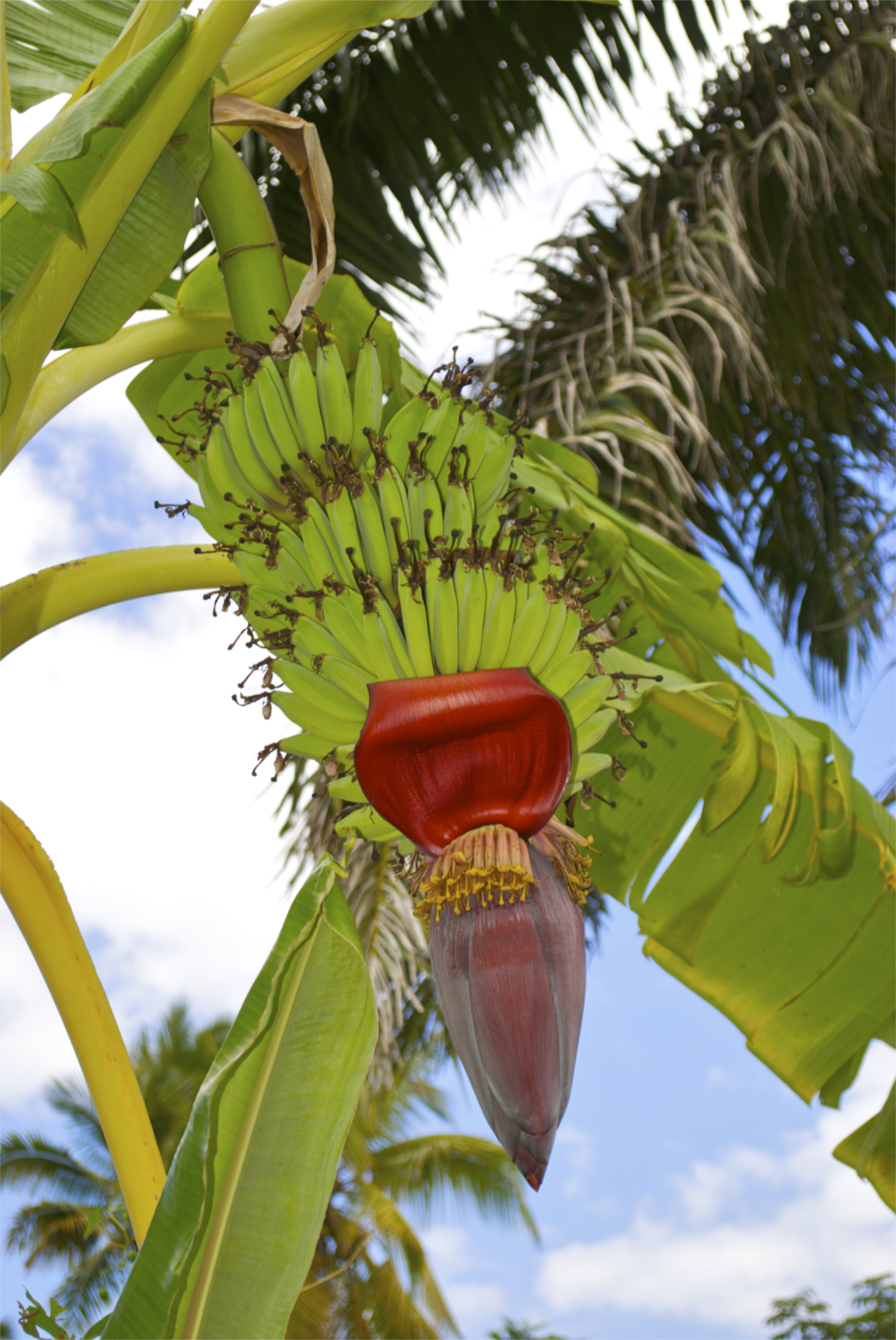 Strunk der Kochbananen-Pflanze